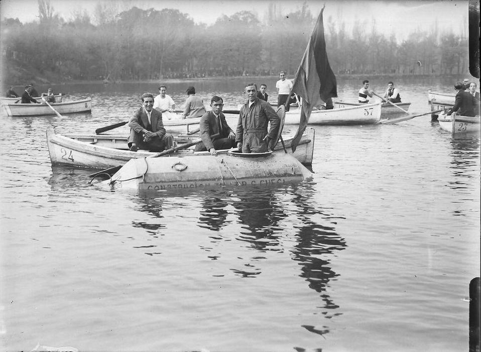 El 24 de octubre de 1932 Adrián Álvarez Ruiz llevó a cabo las pruebas de su generador de aire por tiempo indefinido en el lago de la Casa de Campo. El tanque submarino en el desarrollaron las pruebas se situó, adornado con la bandera republicana, en el centro del lago. Álvarez Ruiz se introdujo en su interior.